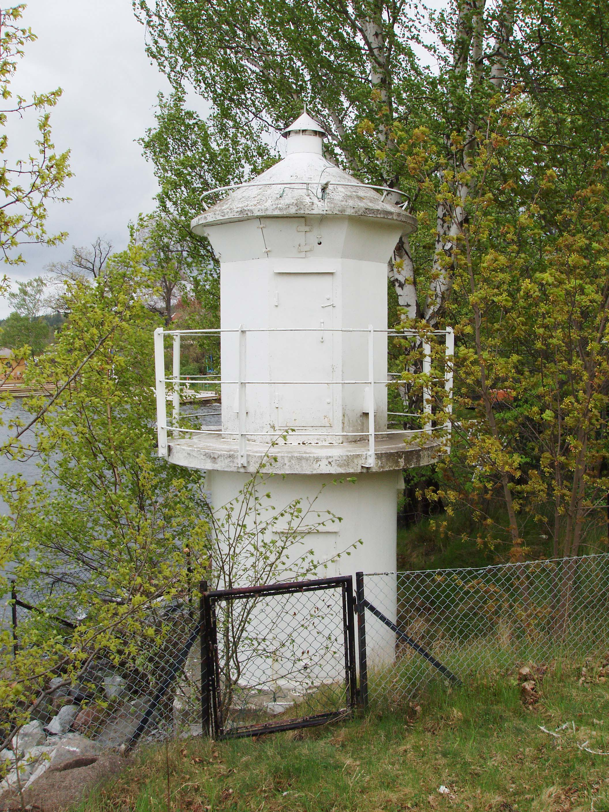 Torsviks fyr, placerad vid stranden söder om Islingeviken på Lidingö. Fyren som förmodligen uppfördes av AGA omkring 1905-10 har tagits ut bruk.